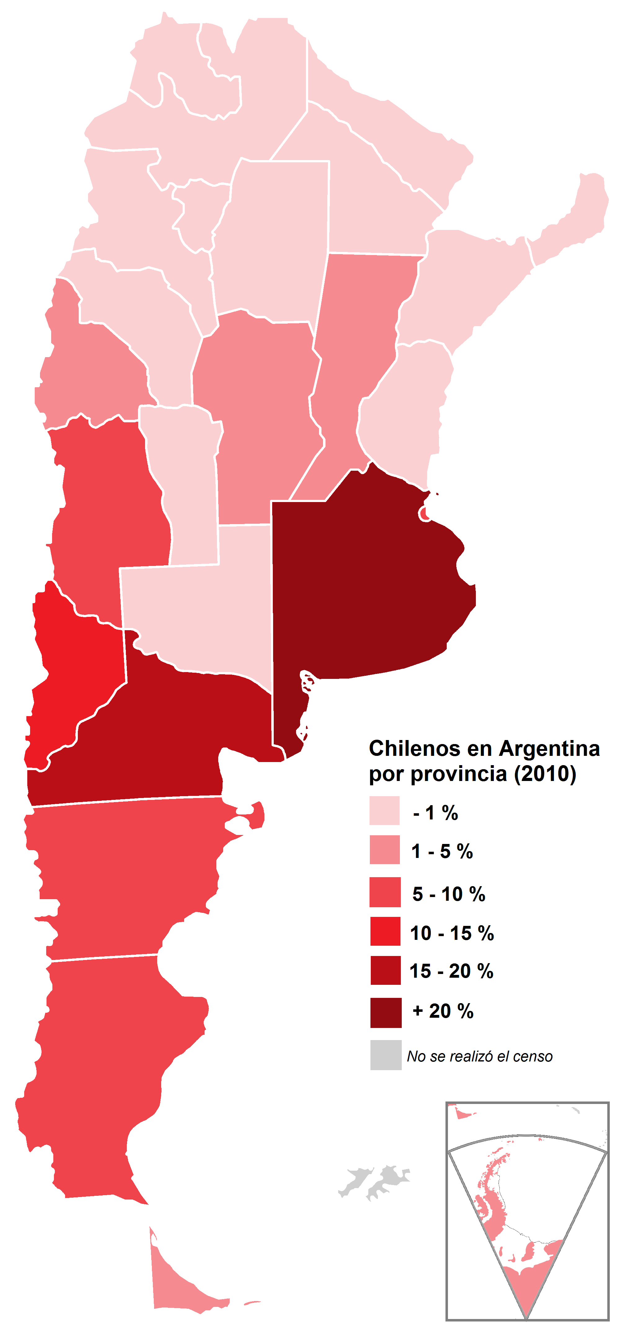 República Argentina por provincia. Población nacida en Chile, en porcentaje. Año 2010. Fuente: Censo 2010 - INDEC.